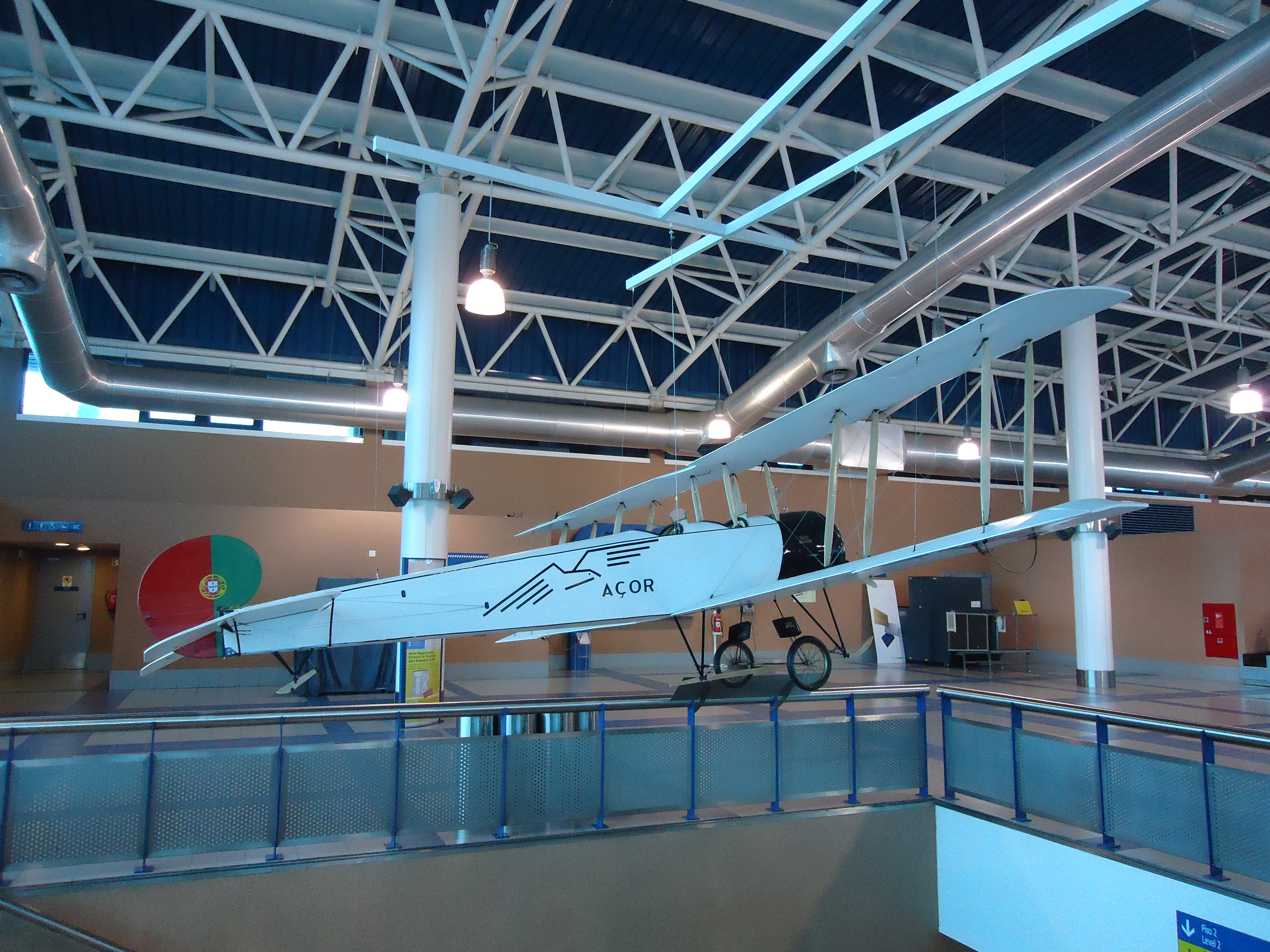 Réplica à escala 1:3 do monomotor biplano Avro 504K "Açor" no Aeroporto Internacional das Lajes, ilha Terceira, nos Açores.